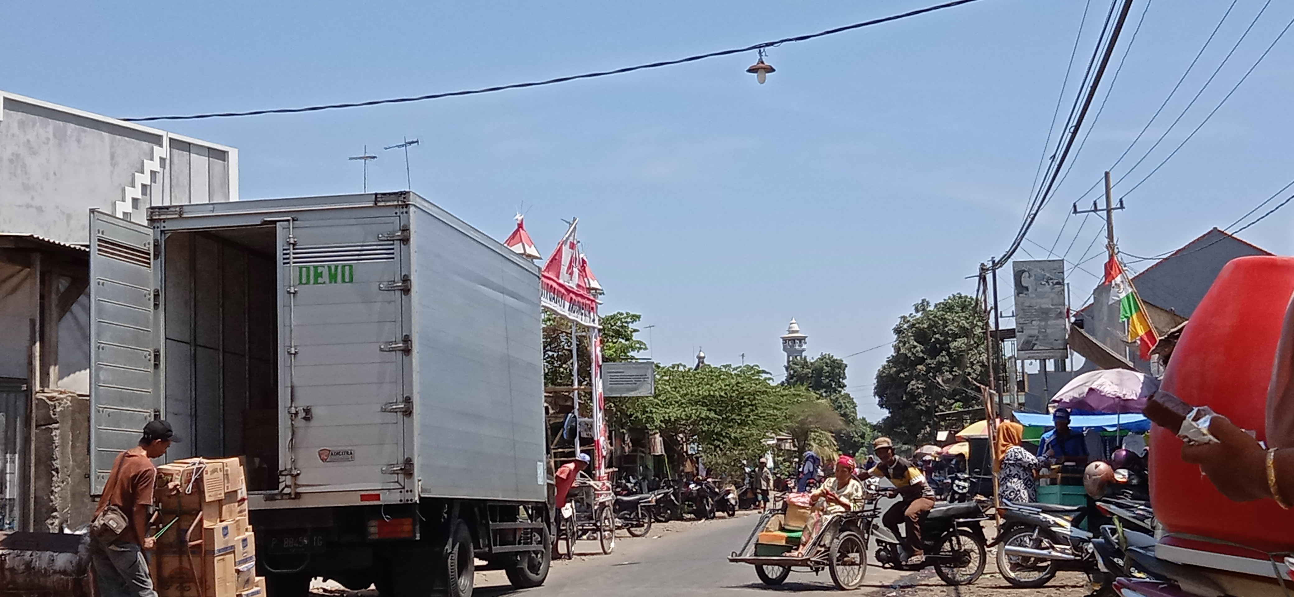 Suasana Urban Sudut Kota di Kotaanyar